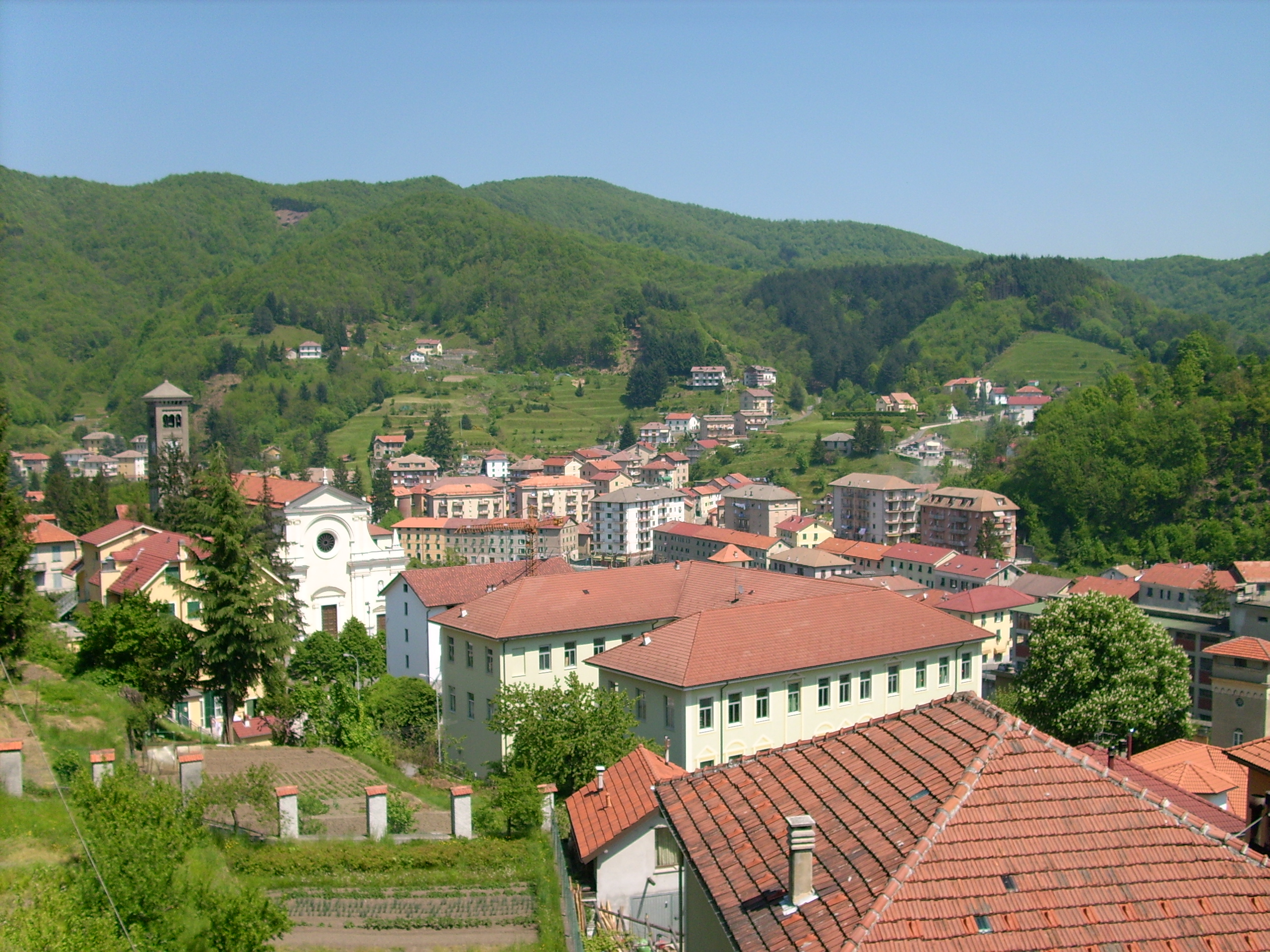 Masone, Liguria, Italia